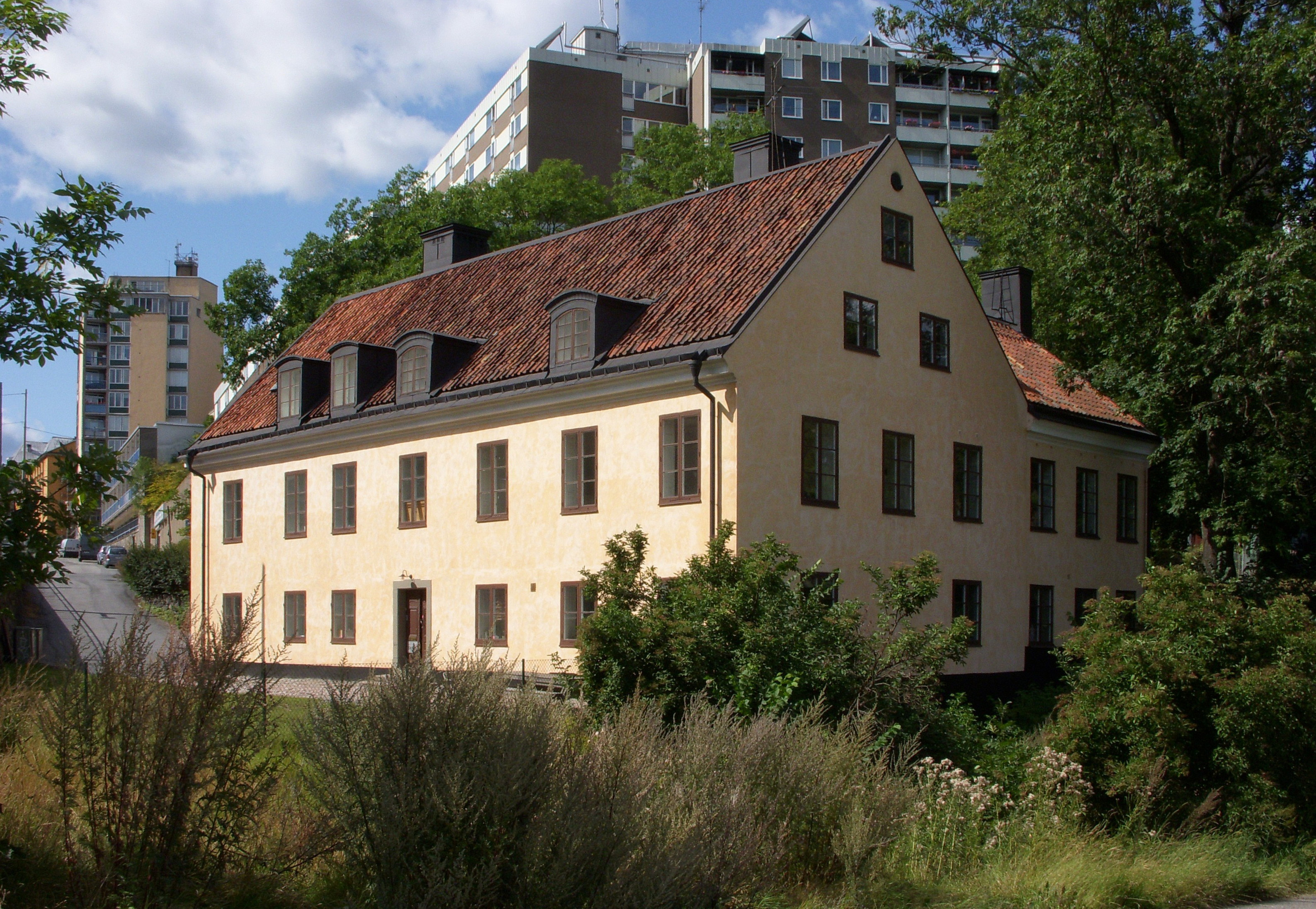 Skeppsbyggmästarbostället vid Varvsbranten/Folkungagatan